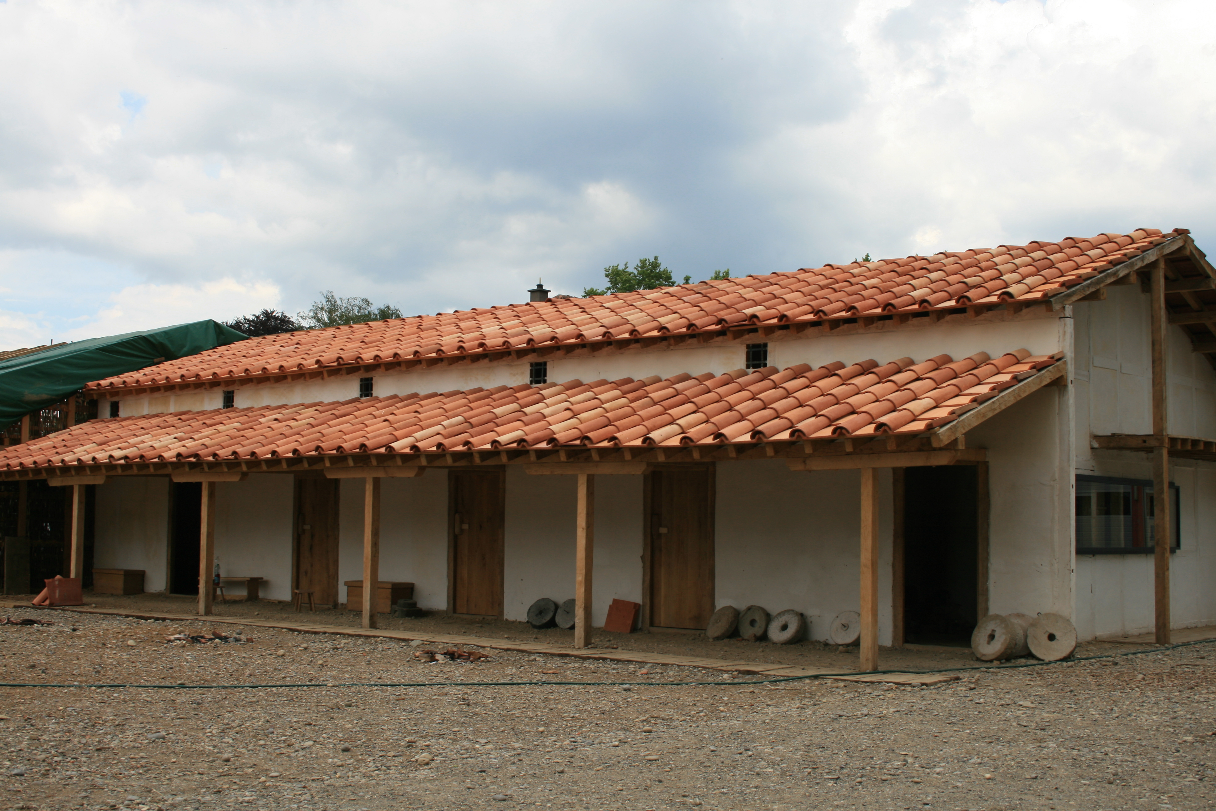 Nachgebaute Contubernia (Legionärspfad Posten I), Vindonissa (Windisch), Schweiz